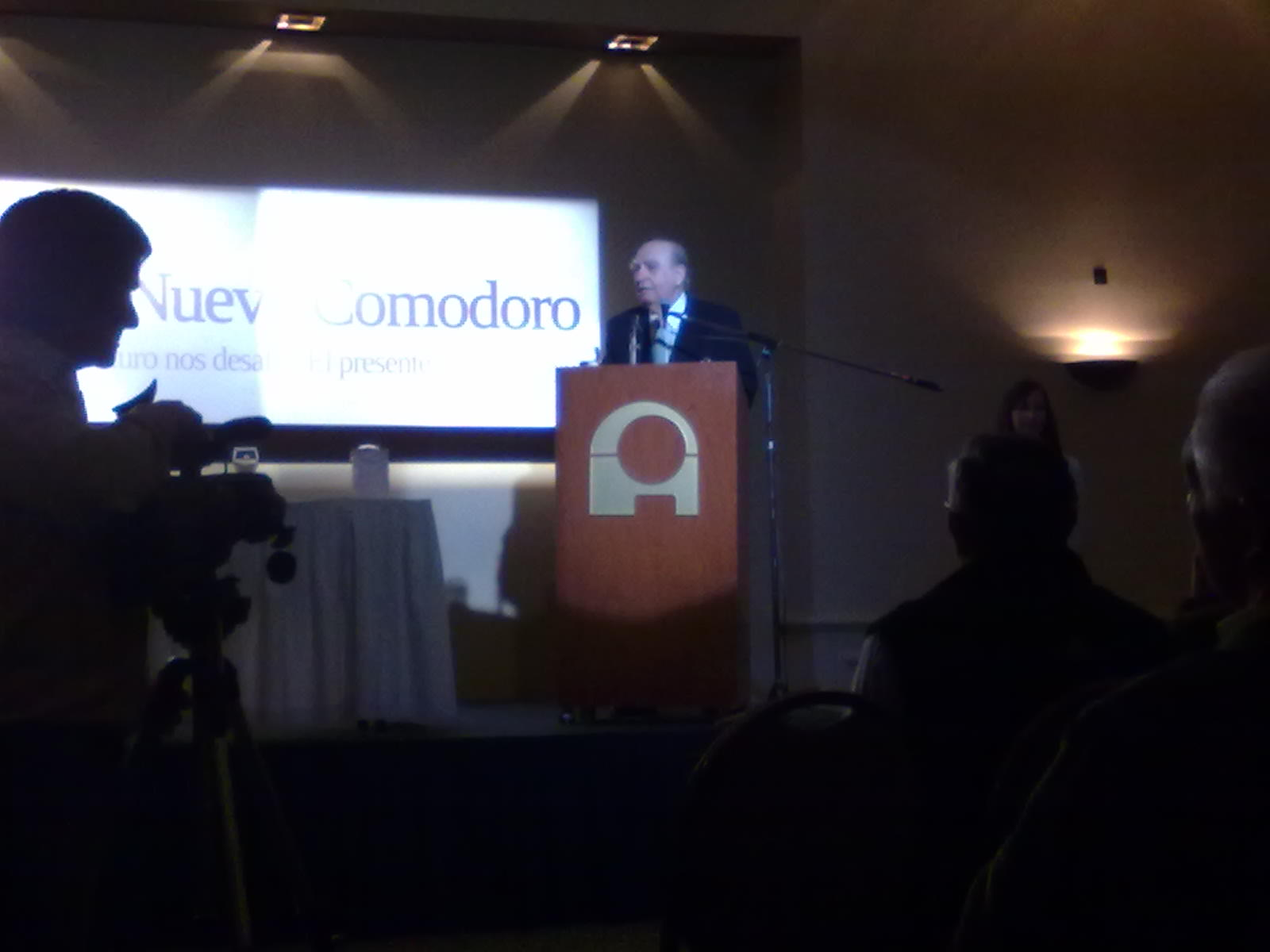 el ex presidente oriental Julio María Sanguinetti disertando en Comodoro Rivadavia.